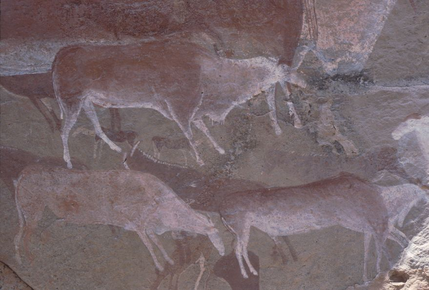 Pitture rupestri. Figure animali, eland.